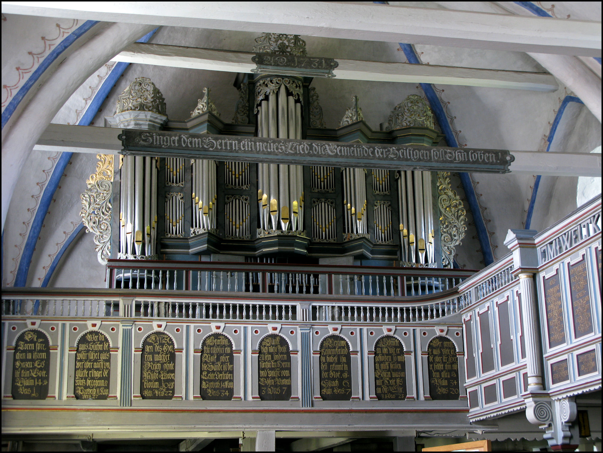 Orgel in Wiefelstede